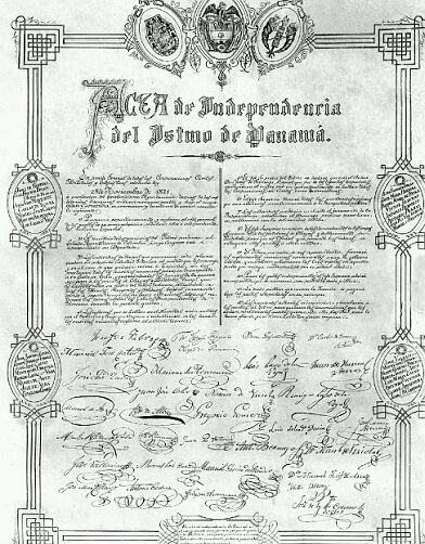 Facsímil del acta por el cual se cristaliza la Independencia de Panamá del Imperio Español el 28 de Noviembre de 1821.